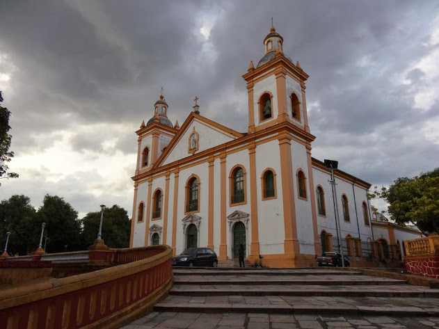 Mother Church - Manaus